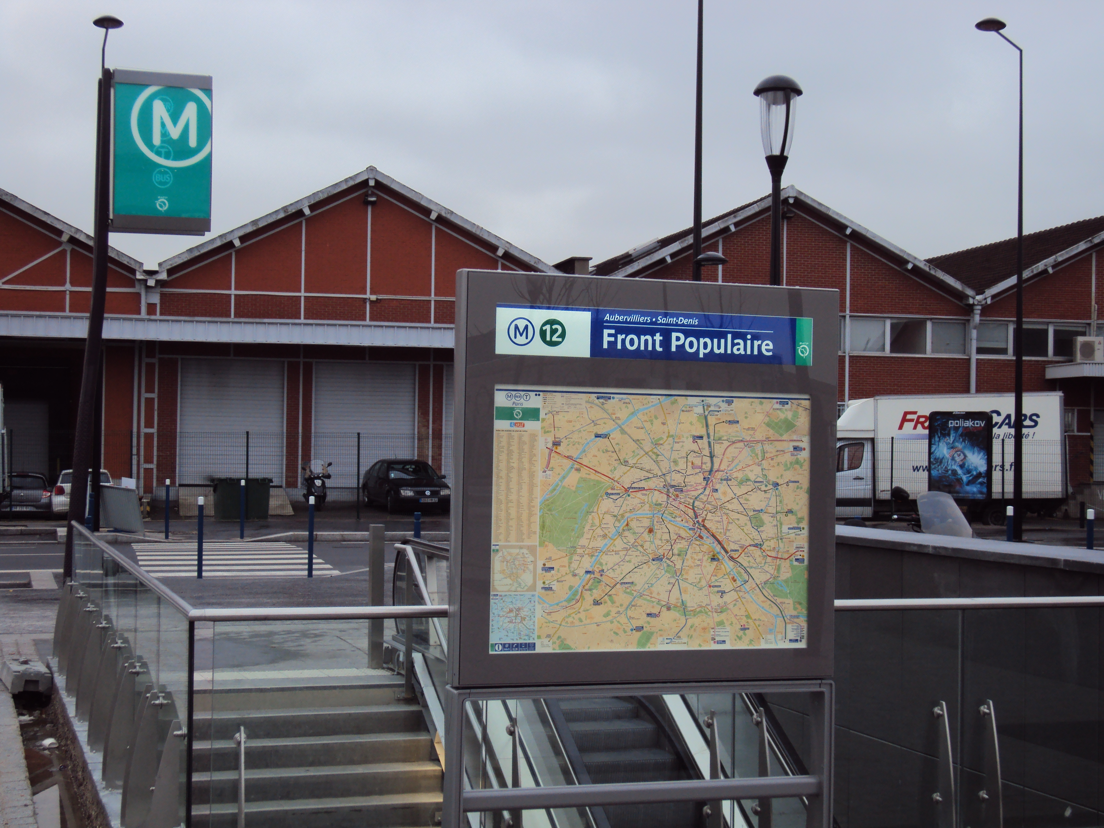 Metro front populaire - decembre 2012